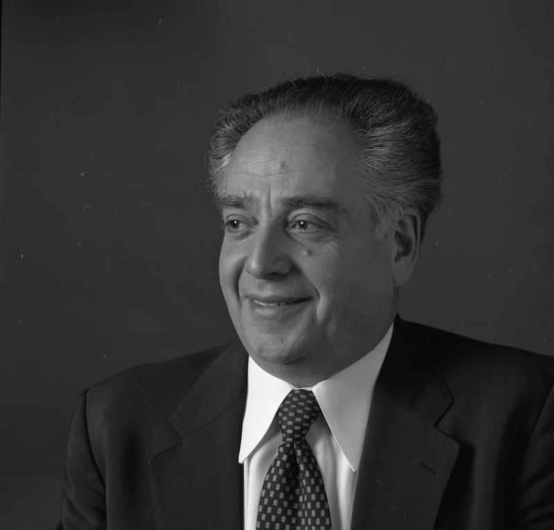 Werner Nachmann: Präsident des Zentralrates der Juden in Deutschland